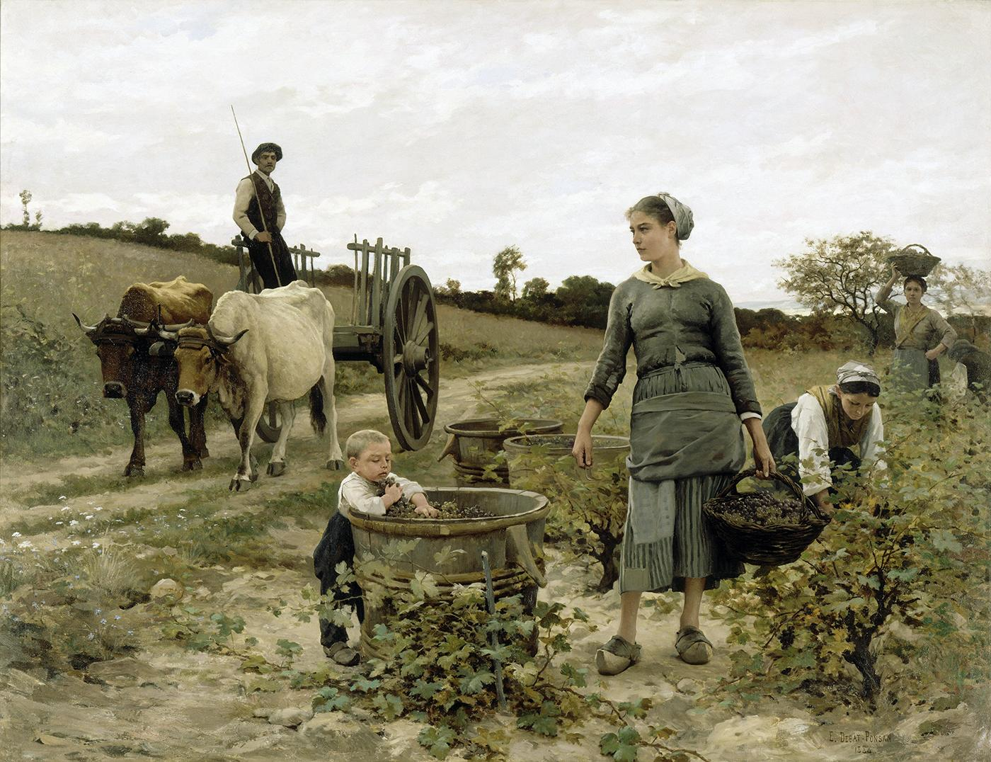 Huile sur toile, un coin de vigne.